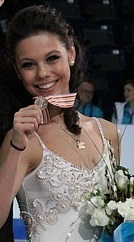 Елена Ильиных и Никита Кацалапов на чемпионате Европы по фигурному катанию 2012